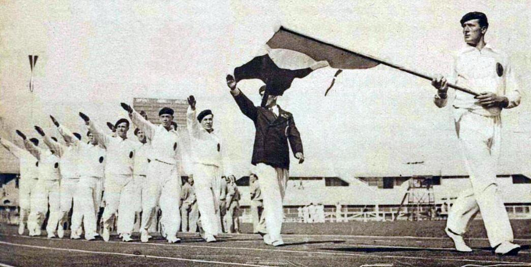 Défilé de l'équipe de France au stadium Mussolini de Turin, lors des premiers championnats d'Europe d'athlétisme en 1934.